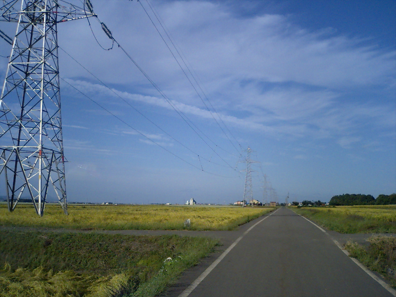 この画像は2008年9月24日投稿者によって、新潟県小千谷市小粟田にて撮影された小粟田原（小粟田北部の田園地帯）の写真。